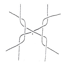 Spletenie dvoch párov nití do tylovej väzby.